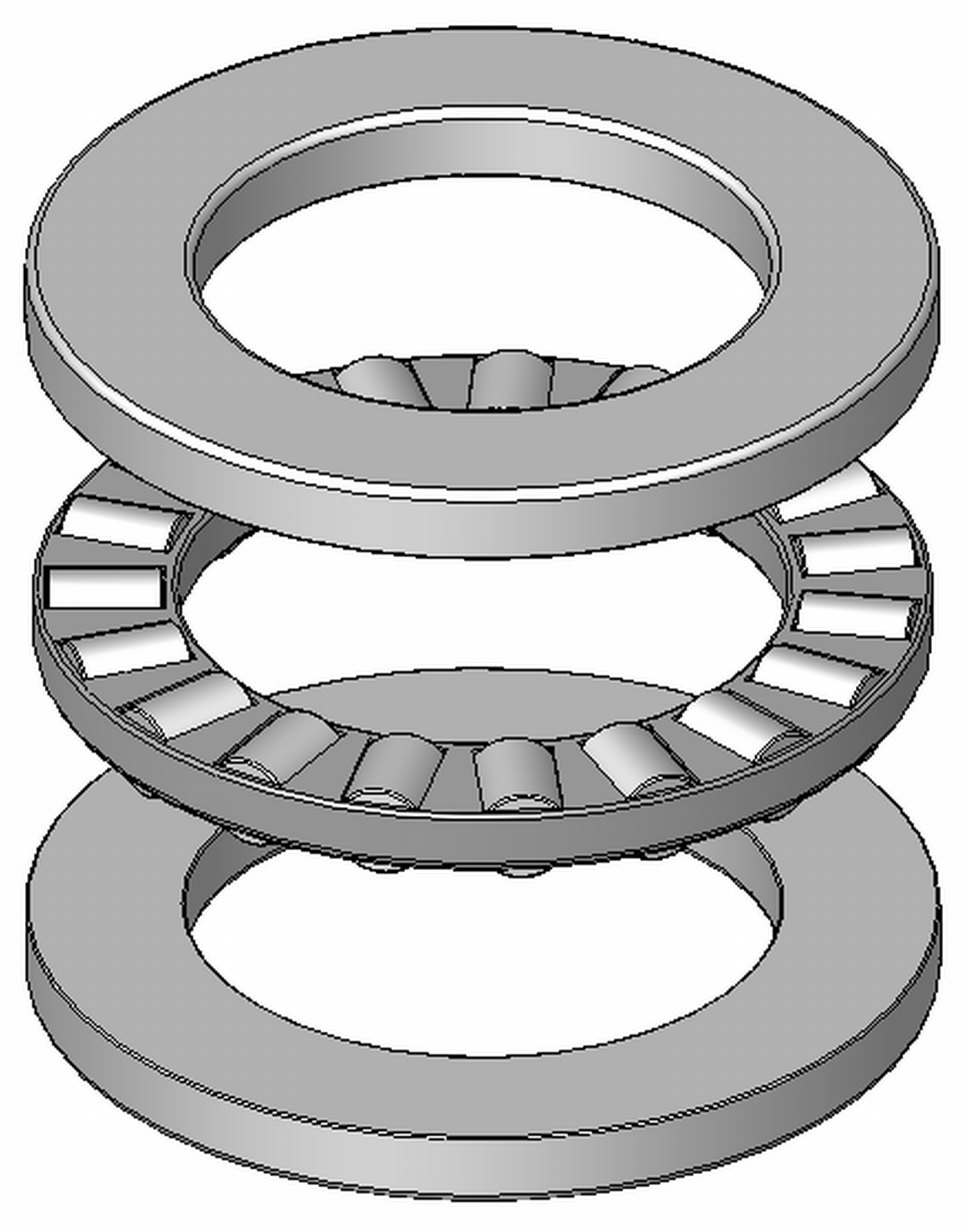 Axial-Zylinderrollenlager, Blechkaefig aus Stahl, zerlegbar, Explosionsdarstellung, Hinweis: Innenaufbau des Lagers (insbesondere des Kaefigs) variiert je nach Hersteller und Baugroesse rolling contact bearings